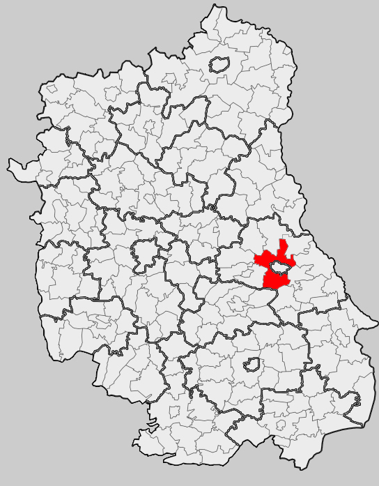 Map of gmina Chełm, Chełm county, Lublin voivodship Mapa gminy Chełm, powiat chełmski, województwo lubelskie